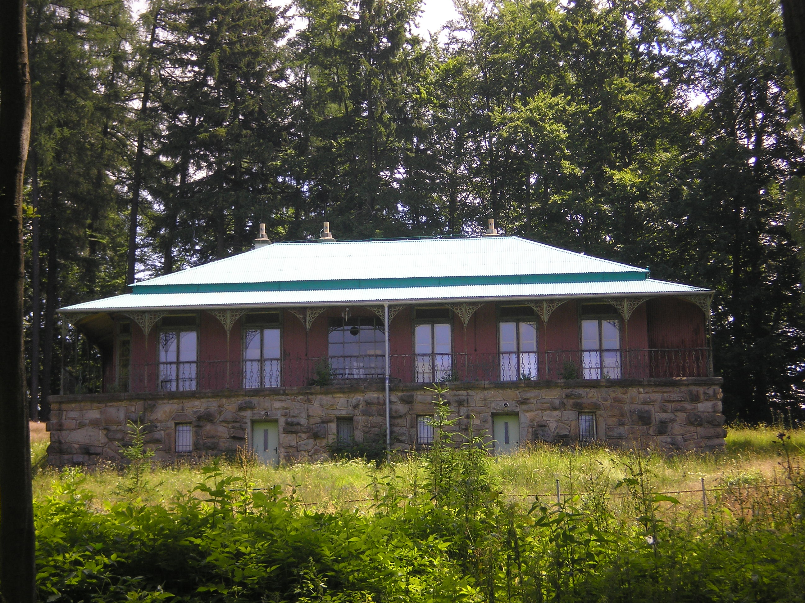 Nové Valteřice, lovecký zámeček